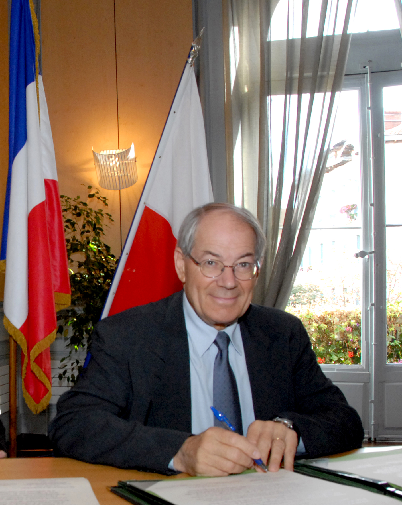 Jean-Michel Bertrand, député maire de Bourg en Bresse, Ain, France.